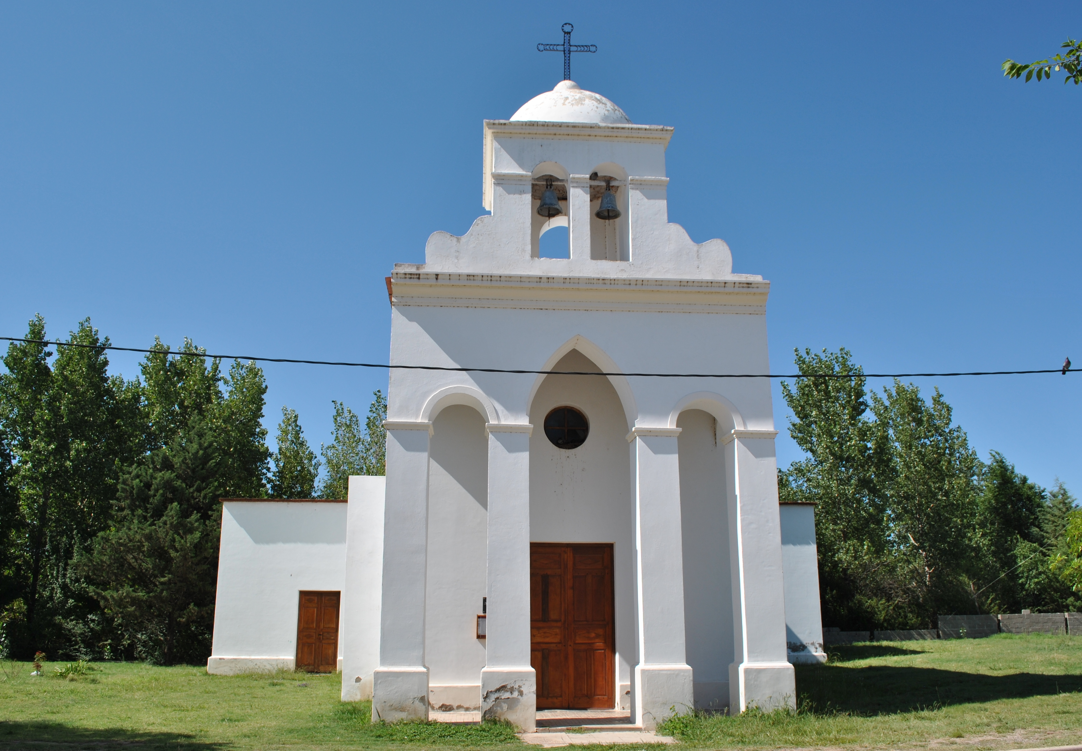 Capilla en Panaholma, Córdoba. Dpto de San Alberto, Diocesis de Cruz del Eje. En 1891 el Cura Brochero pidió su cierre por su avanzado deterioro. El 20/10/1908 se llevan los enseres de la capilla. El mismo Brochero adquirió el altar y el sagrario en 1906. En 2008 se celebro su "centenario". Es reconocida como "la última obra del Padre José Gabriel del Rosario Brochero"